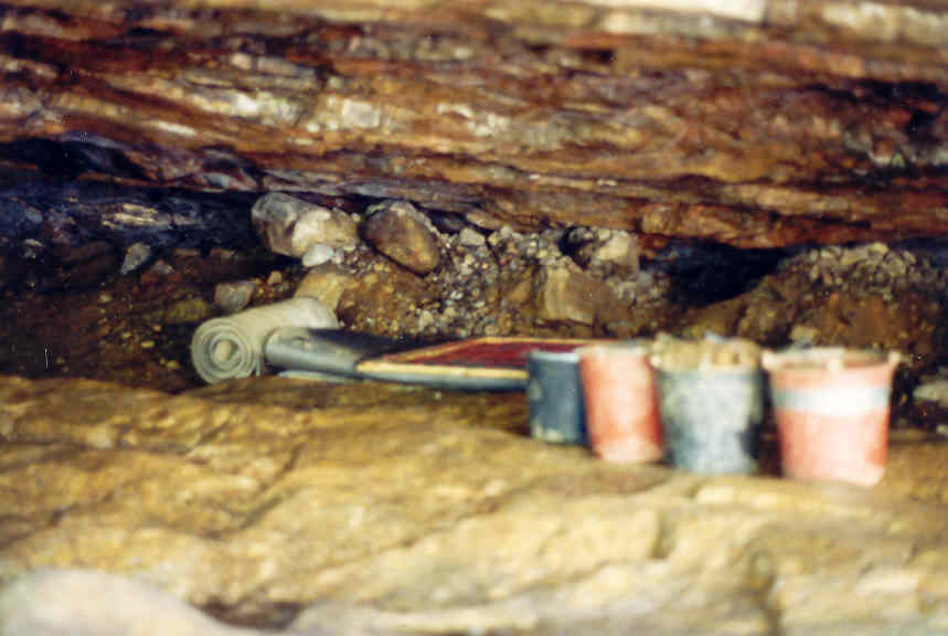 Utgrävningarna i Varggrottan fortsätter år efter år.